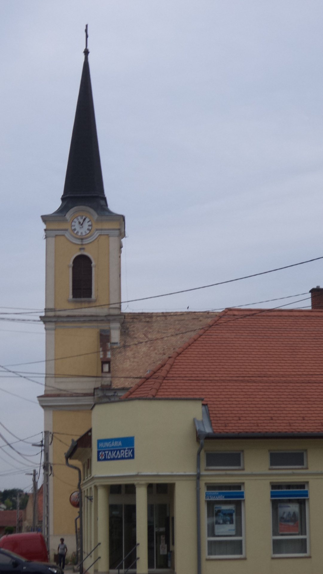 Szászvári Nagyboldogasszony-templom, Baranya megye